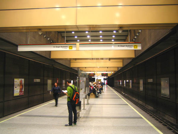 Estació de MetroValencia Àngel Guimerà (L3 i L5).